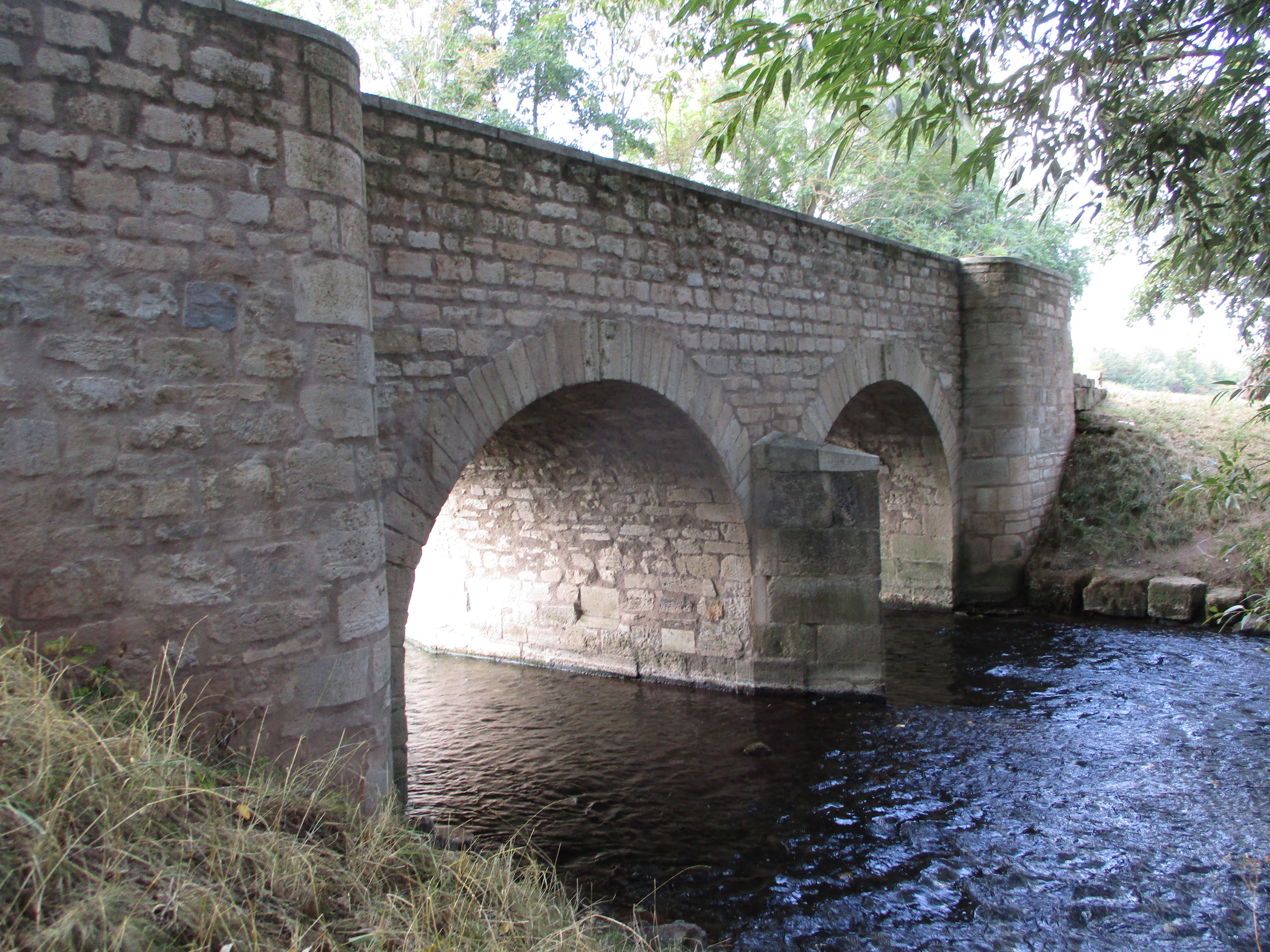 Apostelbrücke über die Wipper nordwestlich von Niedergebra.